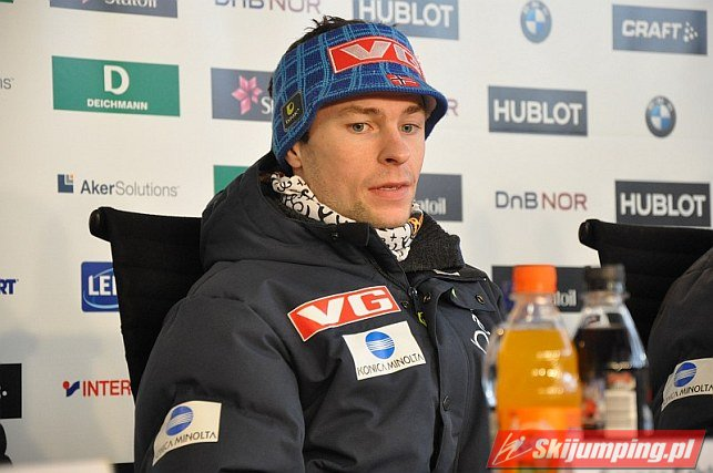 Anders Jacobsen na konferencji prasowej po konkursie drużynowym mężczyzn na skoczni normalnej podczas Mistrzostw Świata w Narciarstwie Klasycznym 2011 w Oslo.